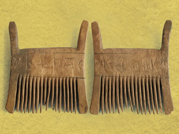 Самшытавы грэбень, знойдзены пры раскопках гарадзішча ў Бярэсці. XIII ст. На грэбені выразаны першыя 13 літар старажытнай кірыліцы: на адным баку (злева) — літары А, Б, В, Г, Д, Е, на другім (справа) — літары Ж, Ѕ, З, И, І, К, Л.